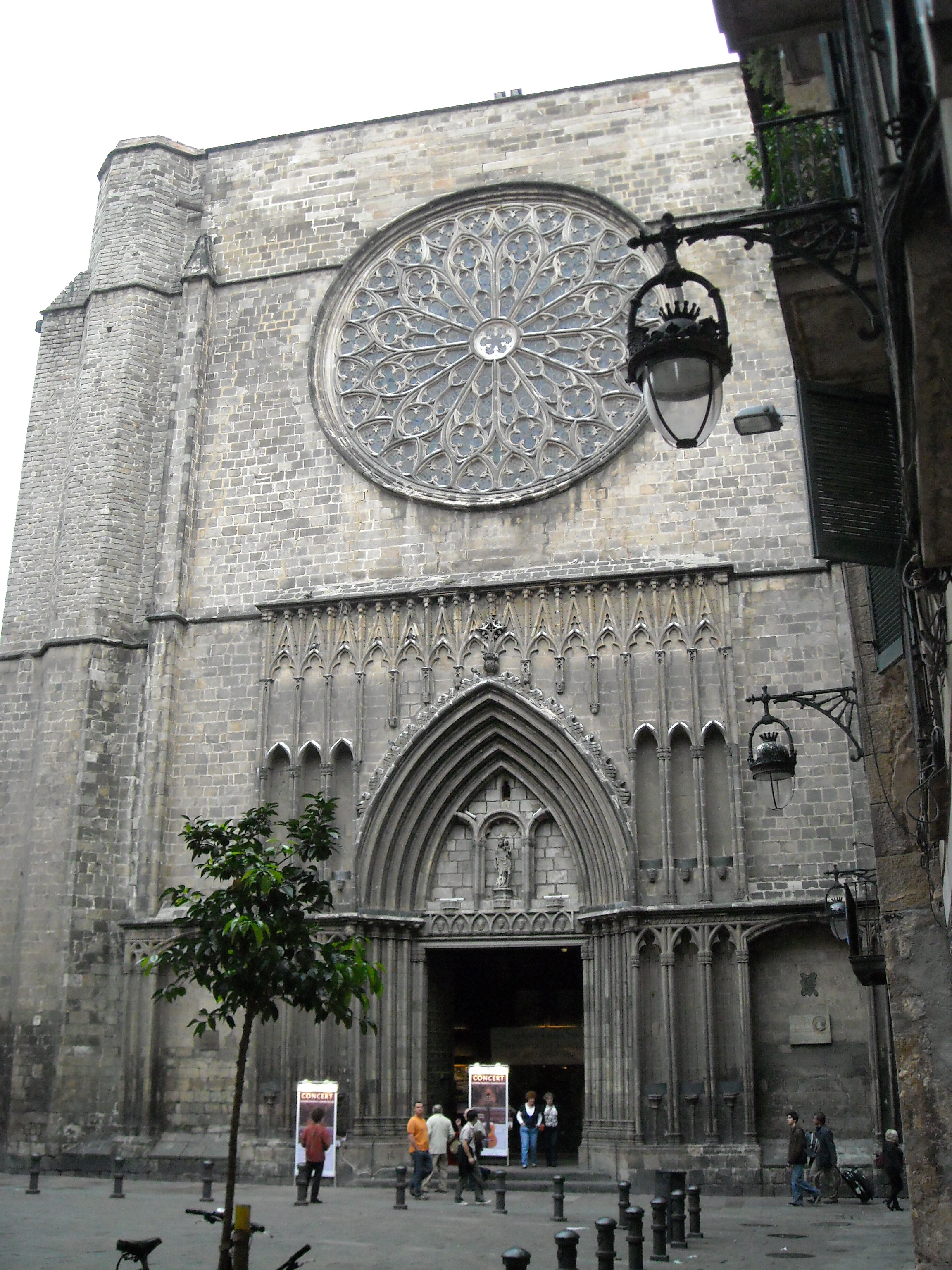 Chiesa di Santa Maria del Pi, Barcellona, Spagna.